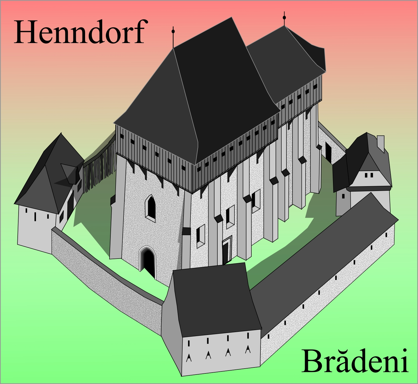 Biserica fortificata din Bradeni